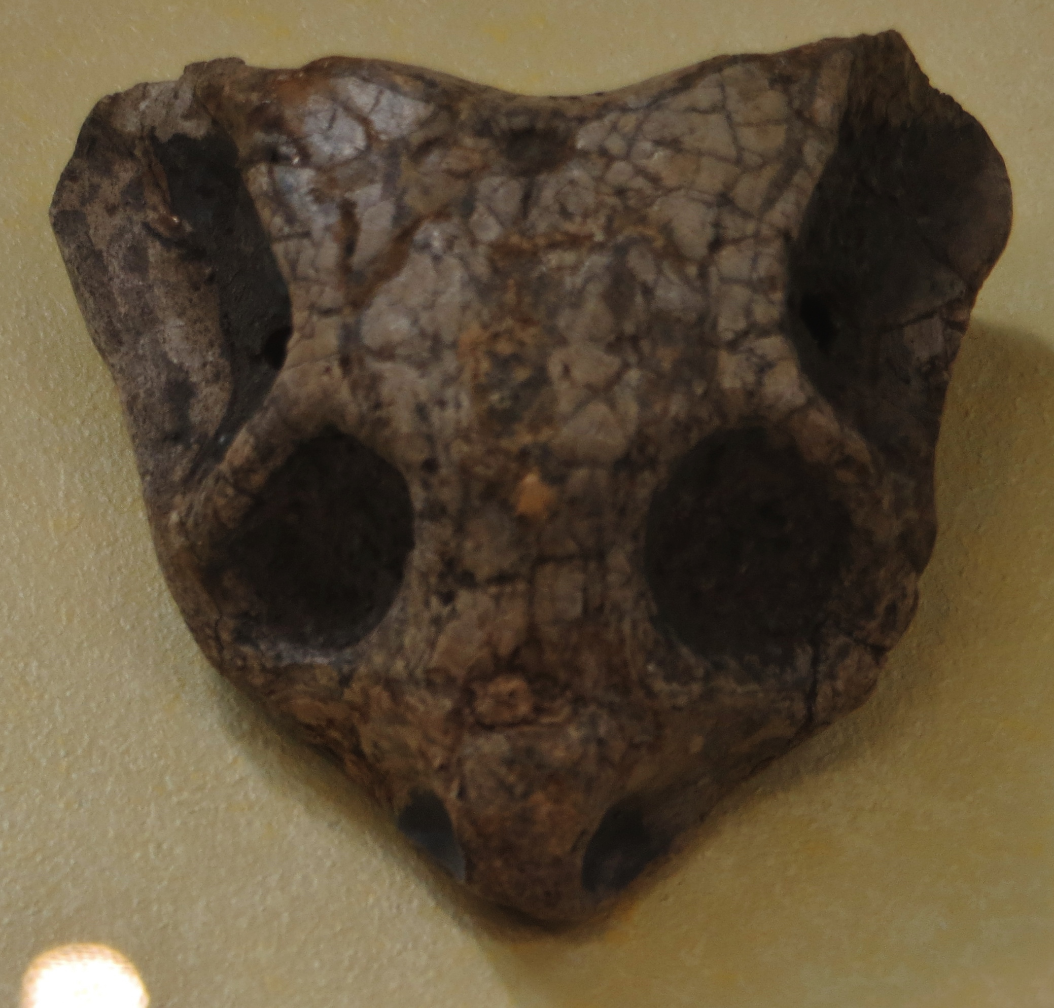 Fossil of Cistecephalus - Took the picture at Natural History Museum, Bonn University